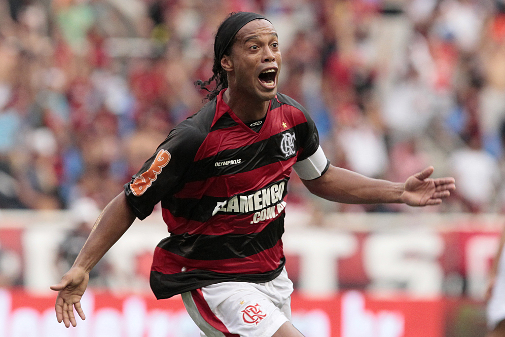 Ronaldinho Gaúcho no final da Taça Guanabara 2011.